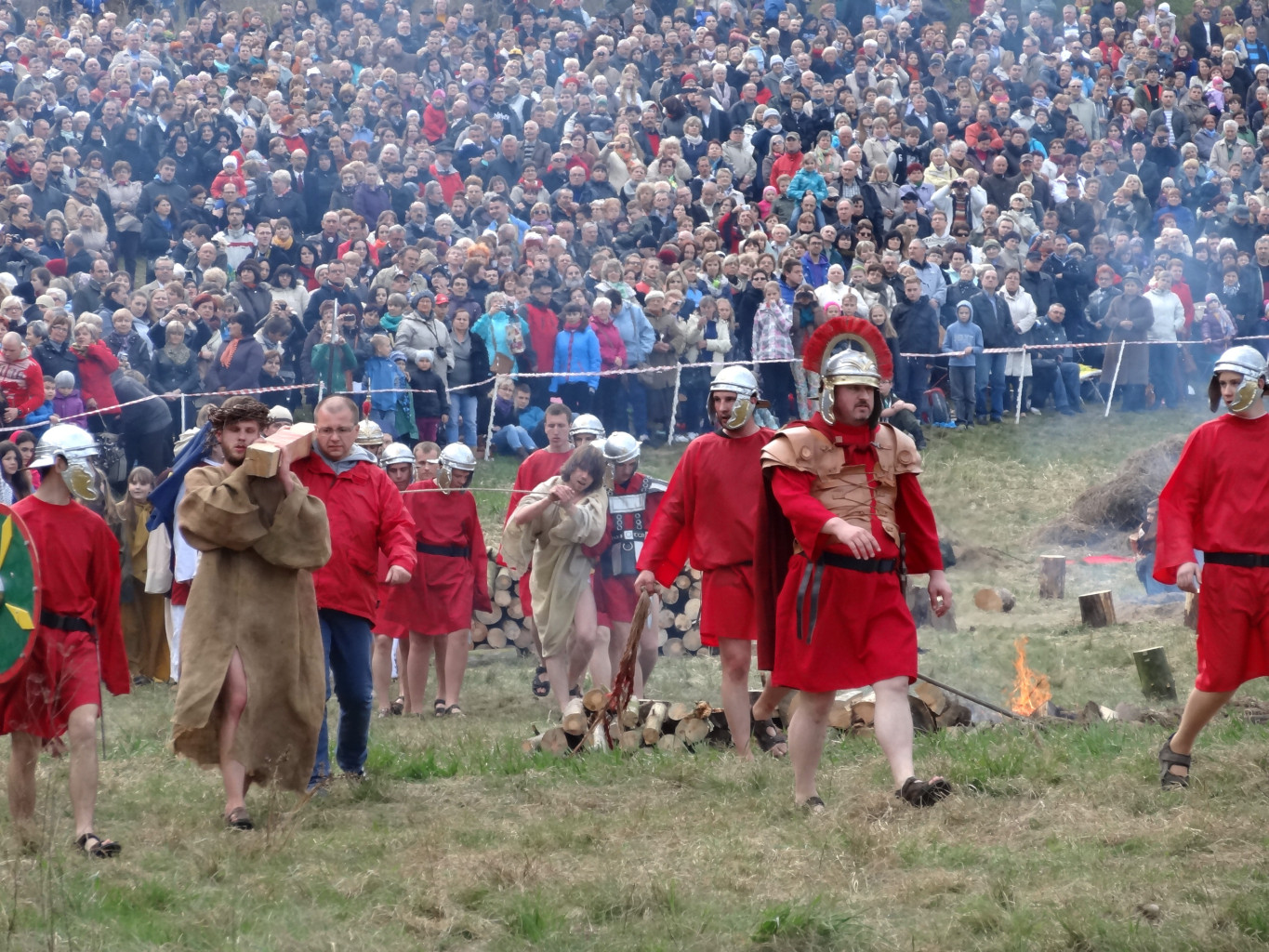 Misterium Męki Pańskiej w Dolinie Śmierci w Bydgoszczy 2014